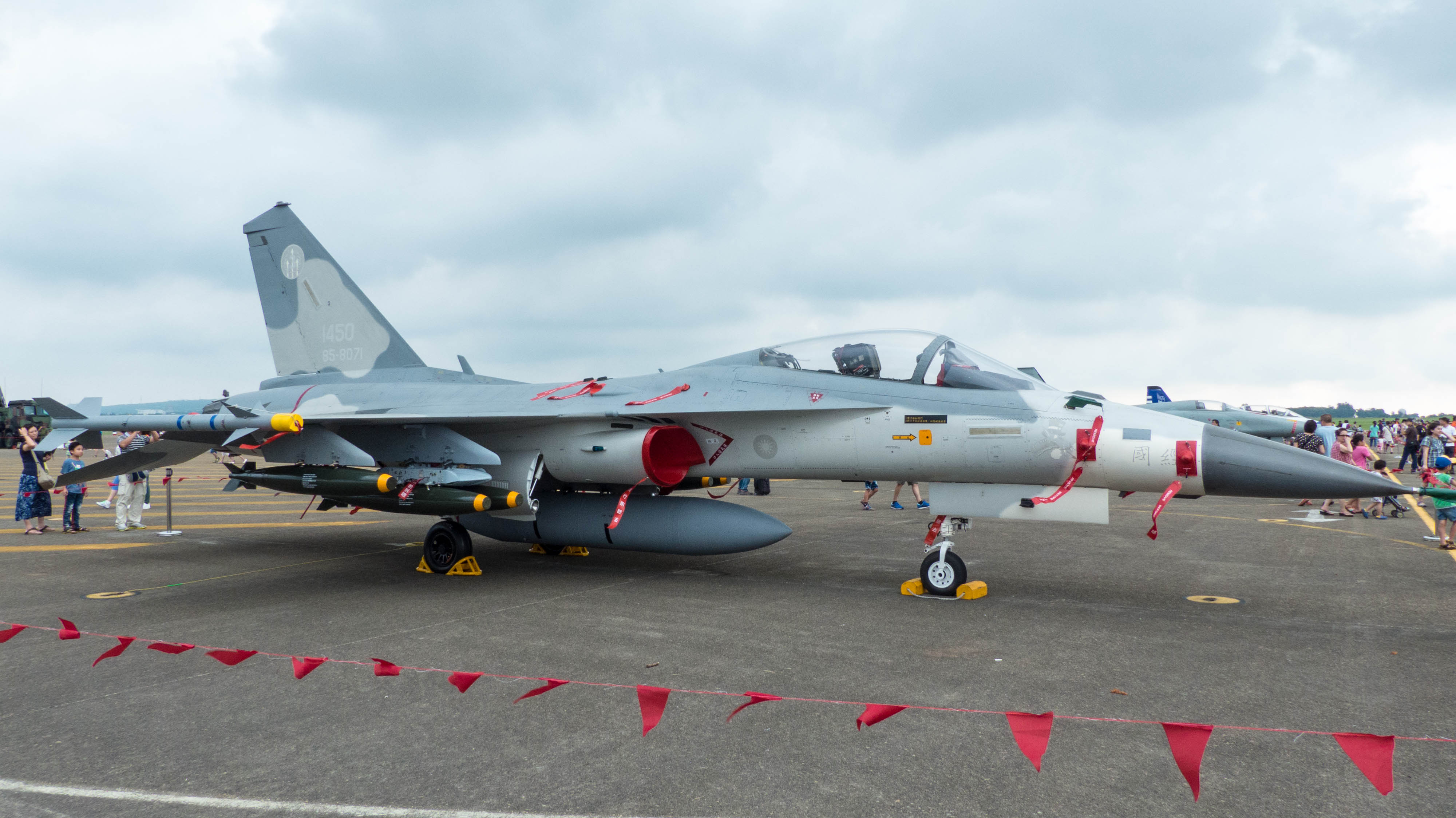 2014年空軍清泉崗基地開放活動，停機坪靜態展示的427聯隊第28作戰隊F-CK-1A 1450經國號戰鬥機右前方。